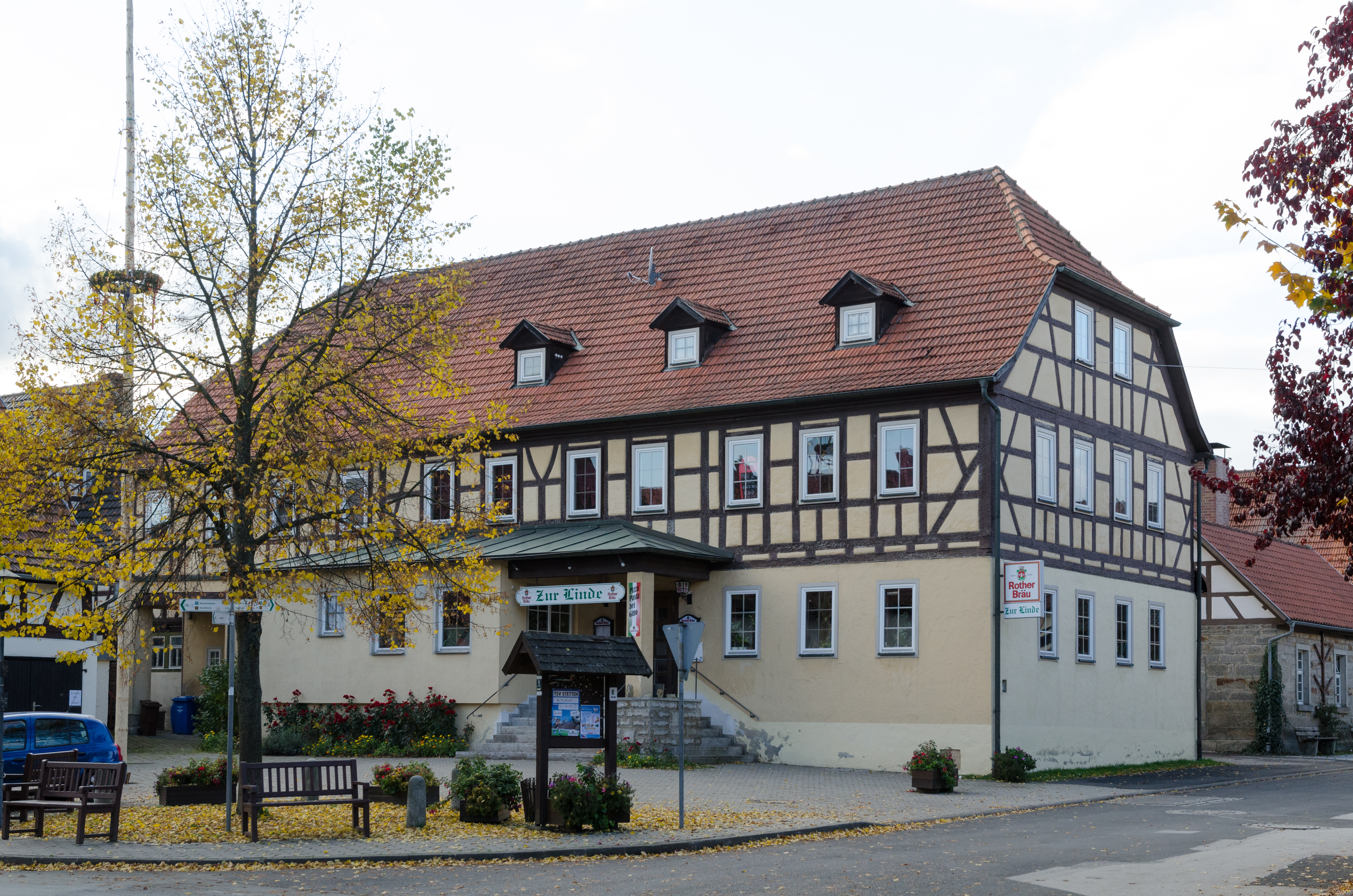 Sondheim, Stetten, Obertor 1